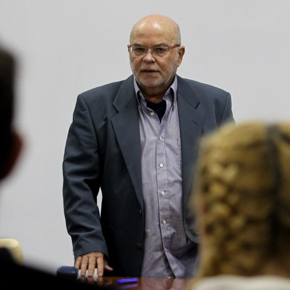 דב קרן בהרצאה בנושא מבנה הכלכלה הבין-לאומית